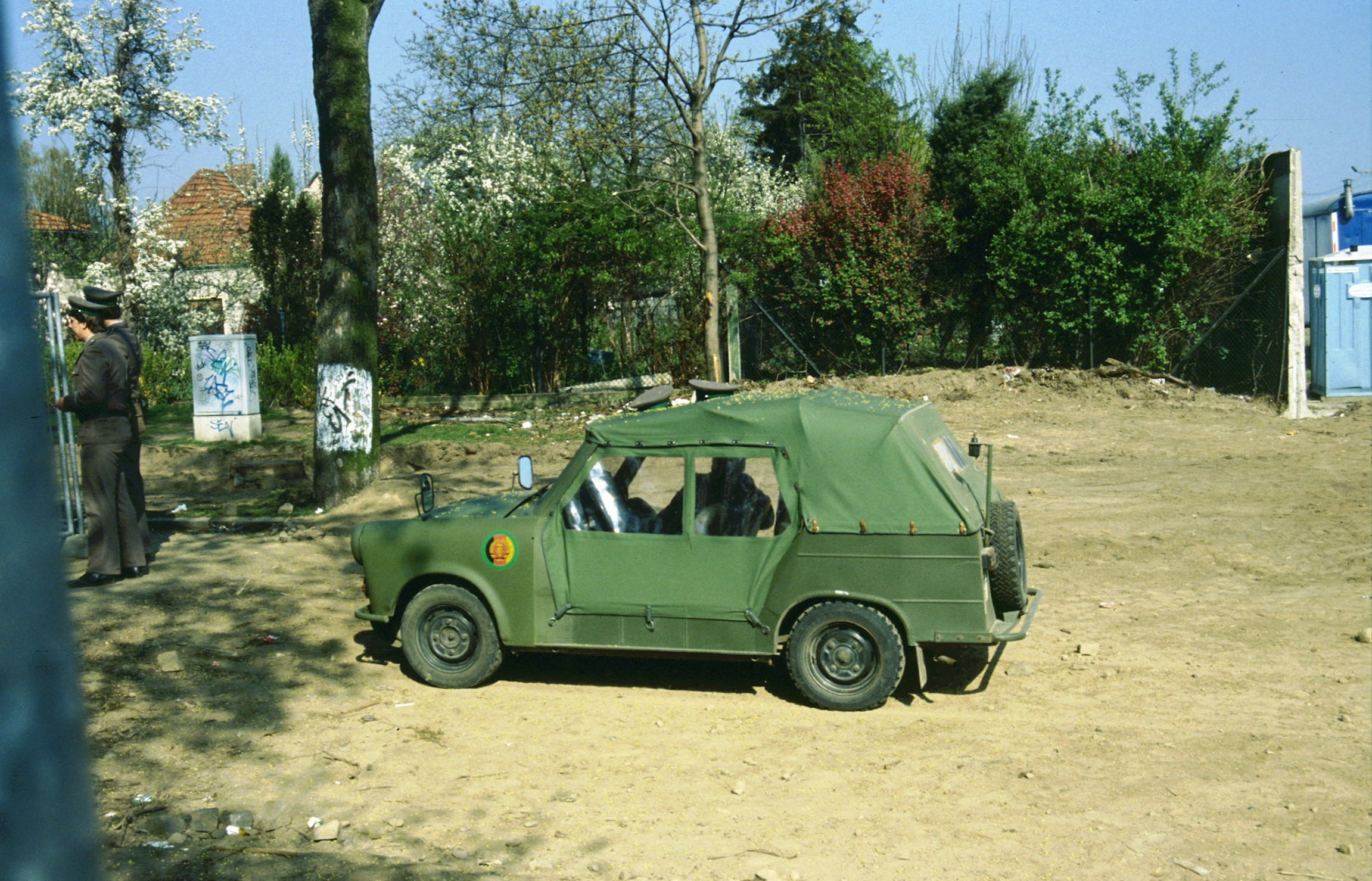 Grenztruppen der DDR mit Trabant-Cabrio am Grenzübergang Groß-Ziethener Straße Berlin-Lichtenrade / Großziethen